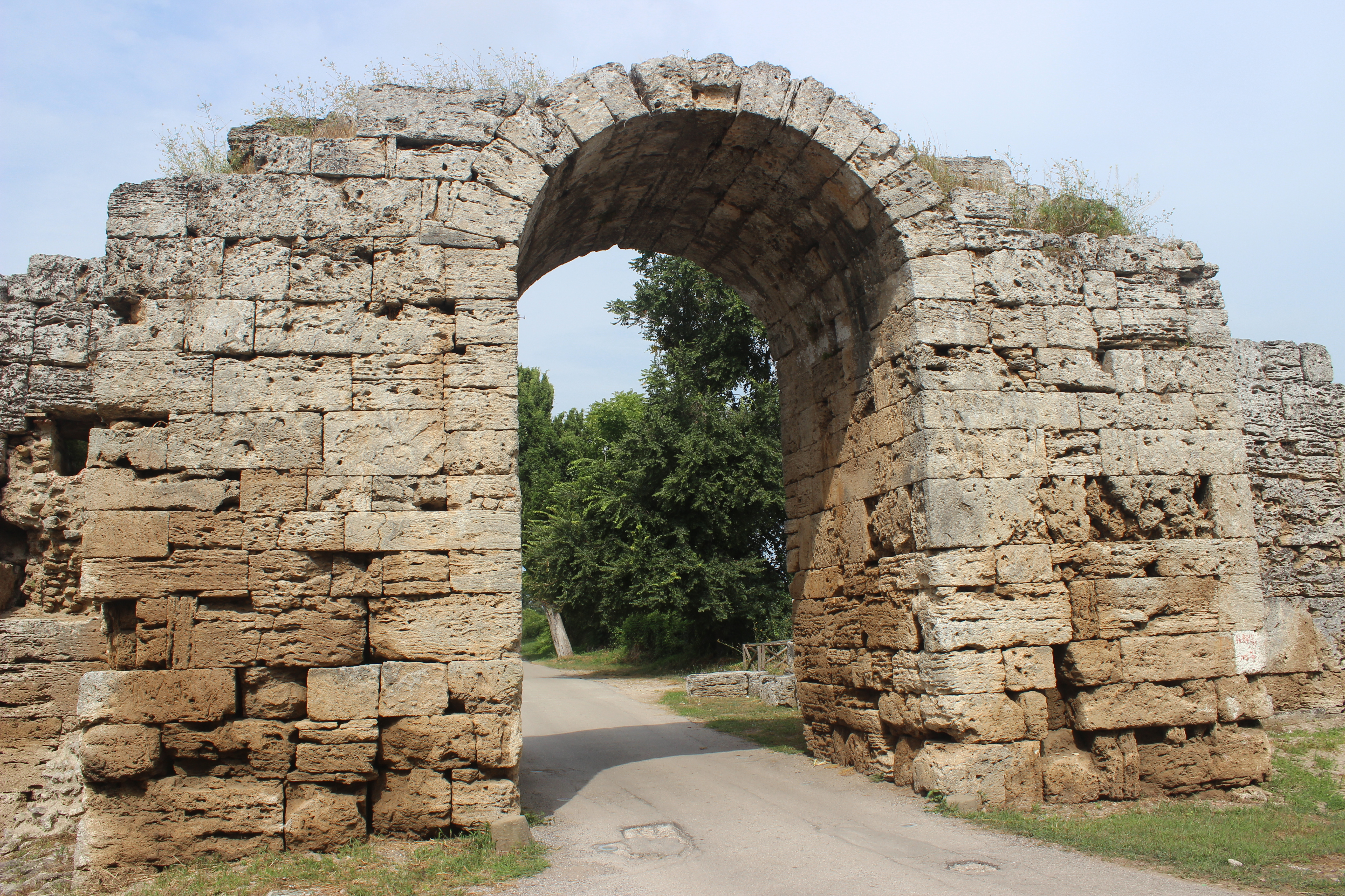 Paestum. Muralla. Porta Sirena.